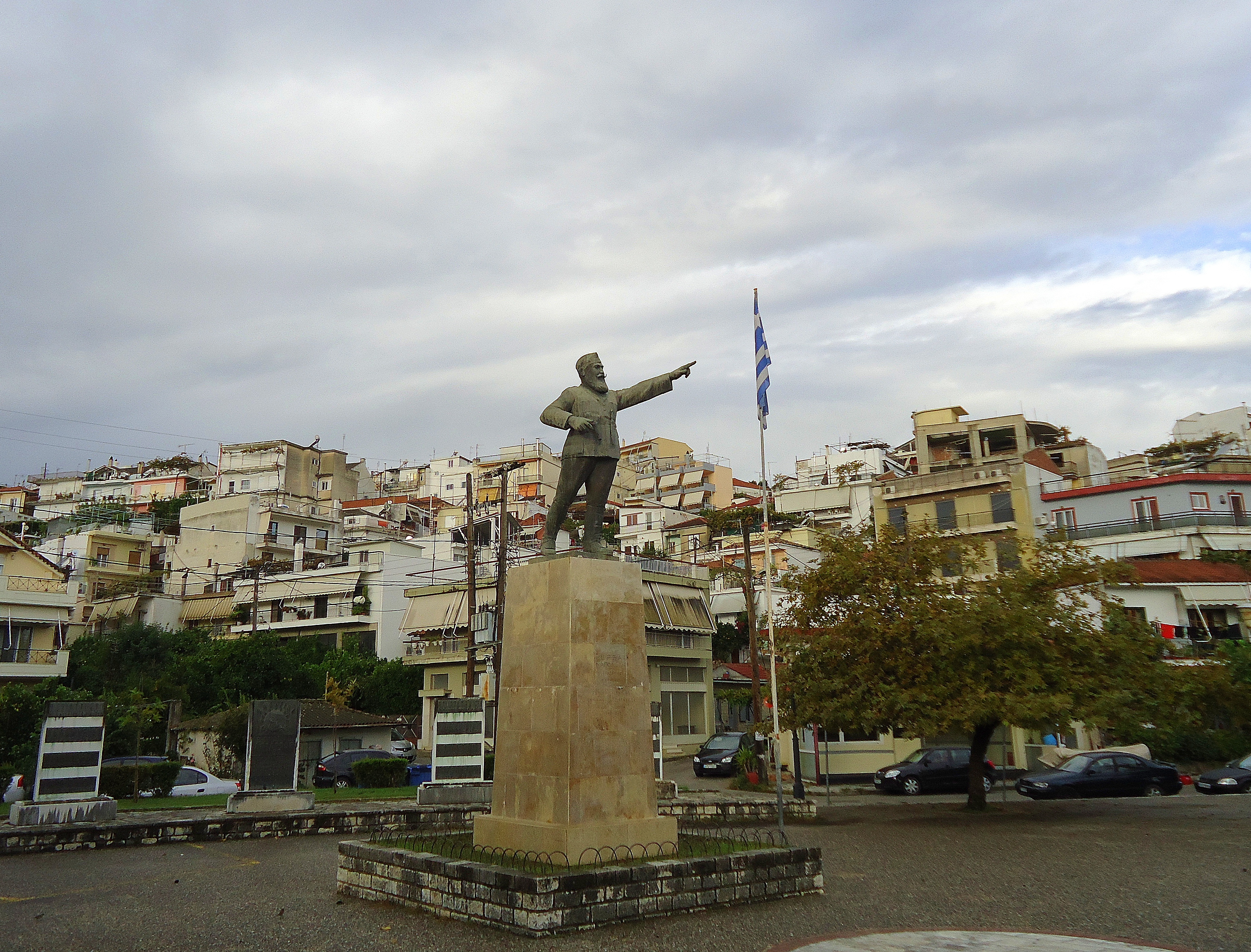 Ν.Ζέρβας, 'Αρτα